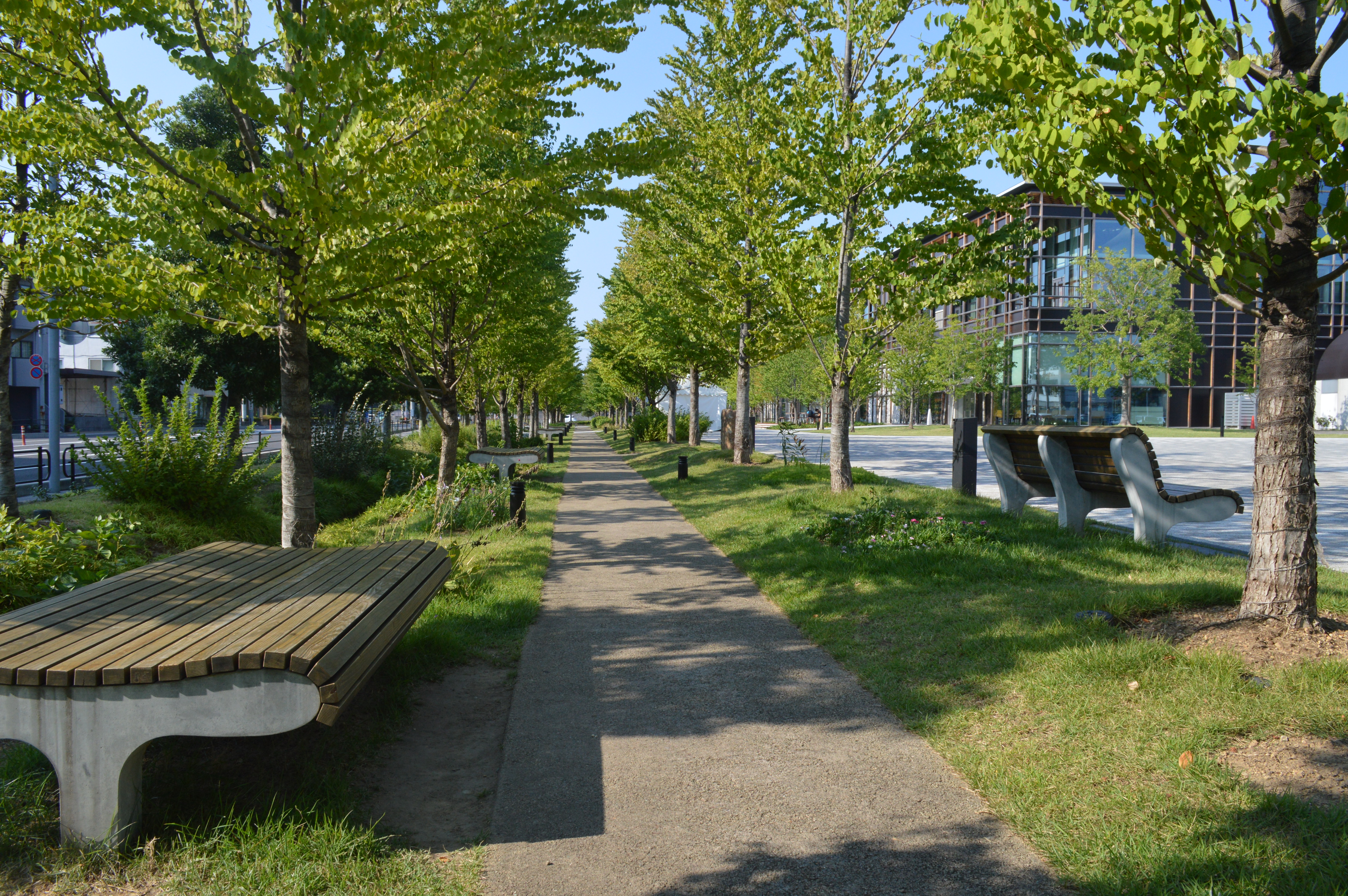 みんなの森 ぎふメディアコスモス。遊歩道「せせらぎの並木 テニテオ」。